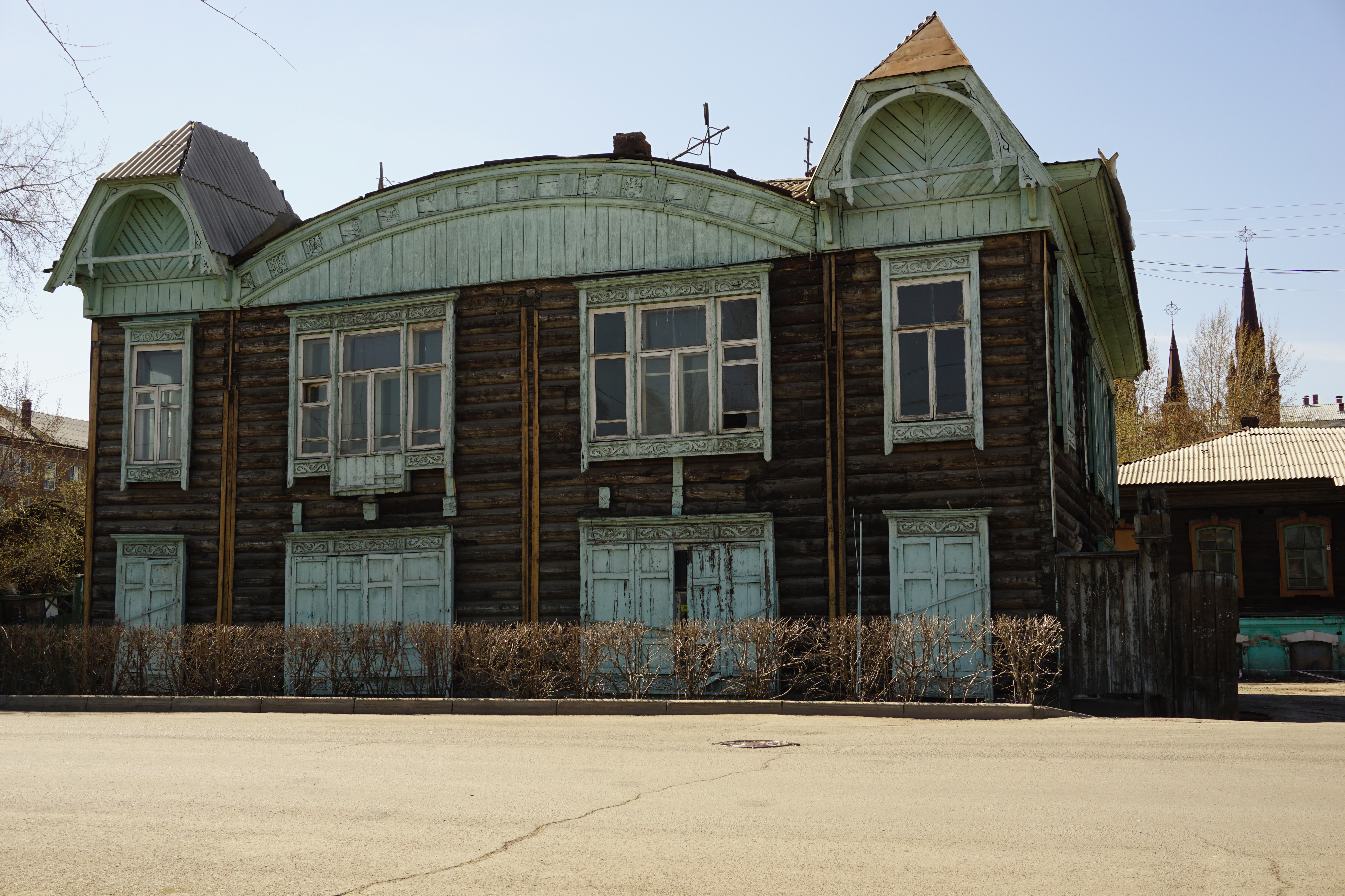 Дом врача Гланца, в котором с апреля 1920 г. размещалась народная консерватория - первое музыкальное заведение г. Красноярска (дерево): улица Горького, 11, Красноярск, Красноярский край